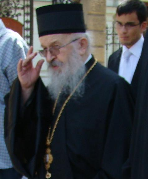 Владика Артемије Радосављевић у Сремским Карловцима у мају 2009.-те године